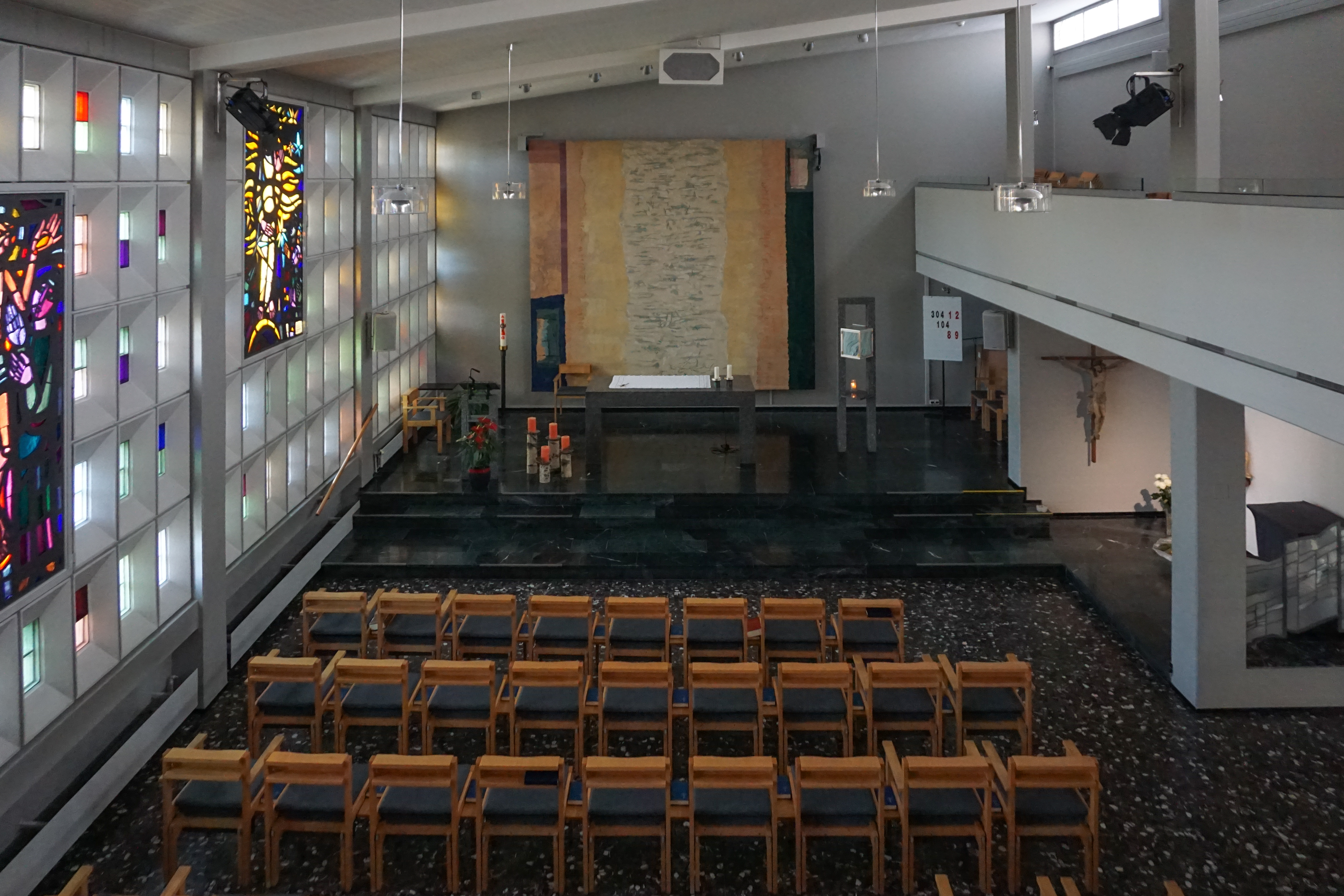 Inneres von der Empore gegen Chor